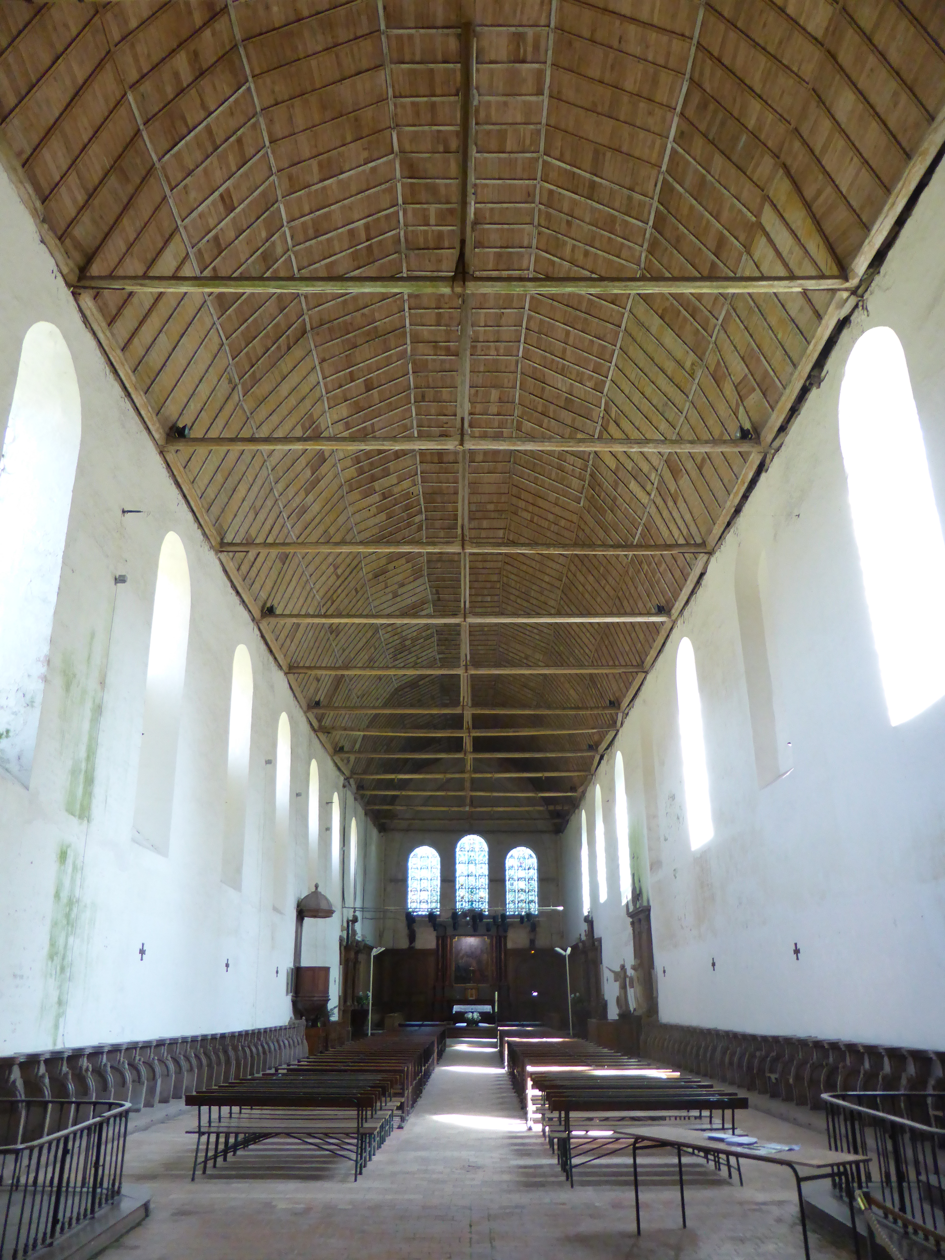 Nef de l'église abbatiale de la Sainte-Trinité de Tiron, à Thiron-Gardais, Eure-et-Loir.